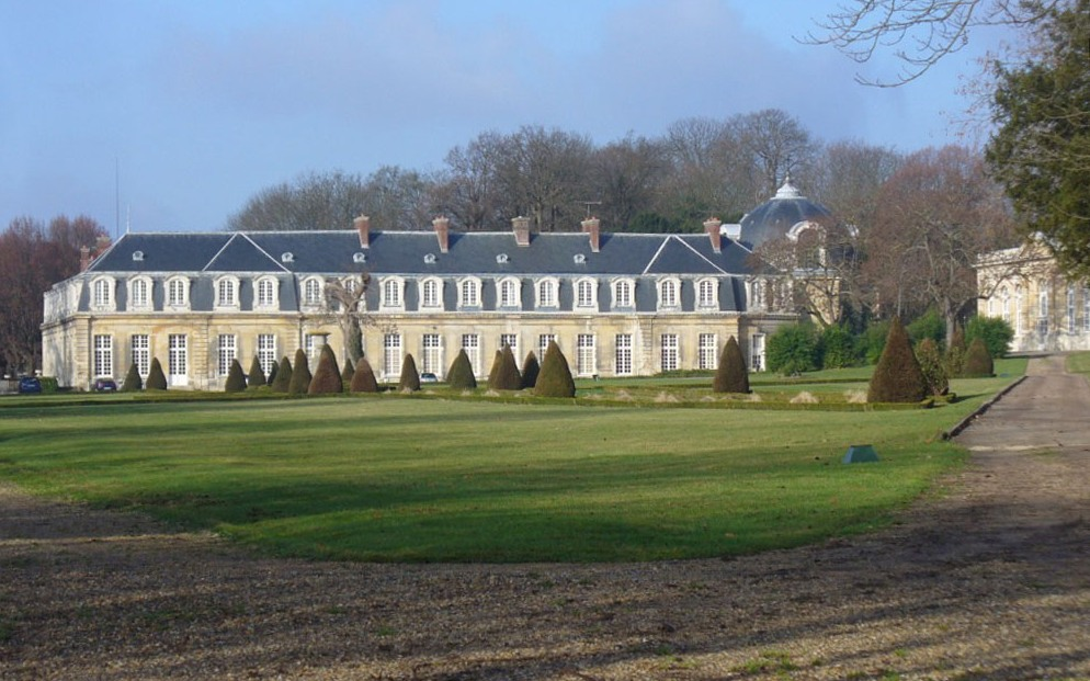 Château d'Arnouville lès Gonesse (95)